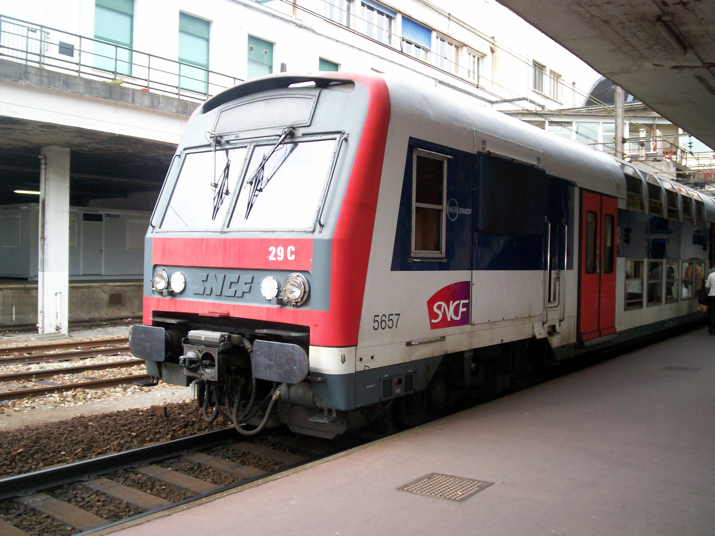 Gare de Versailles-Chantiers